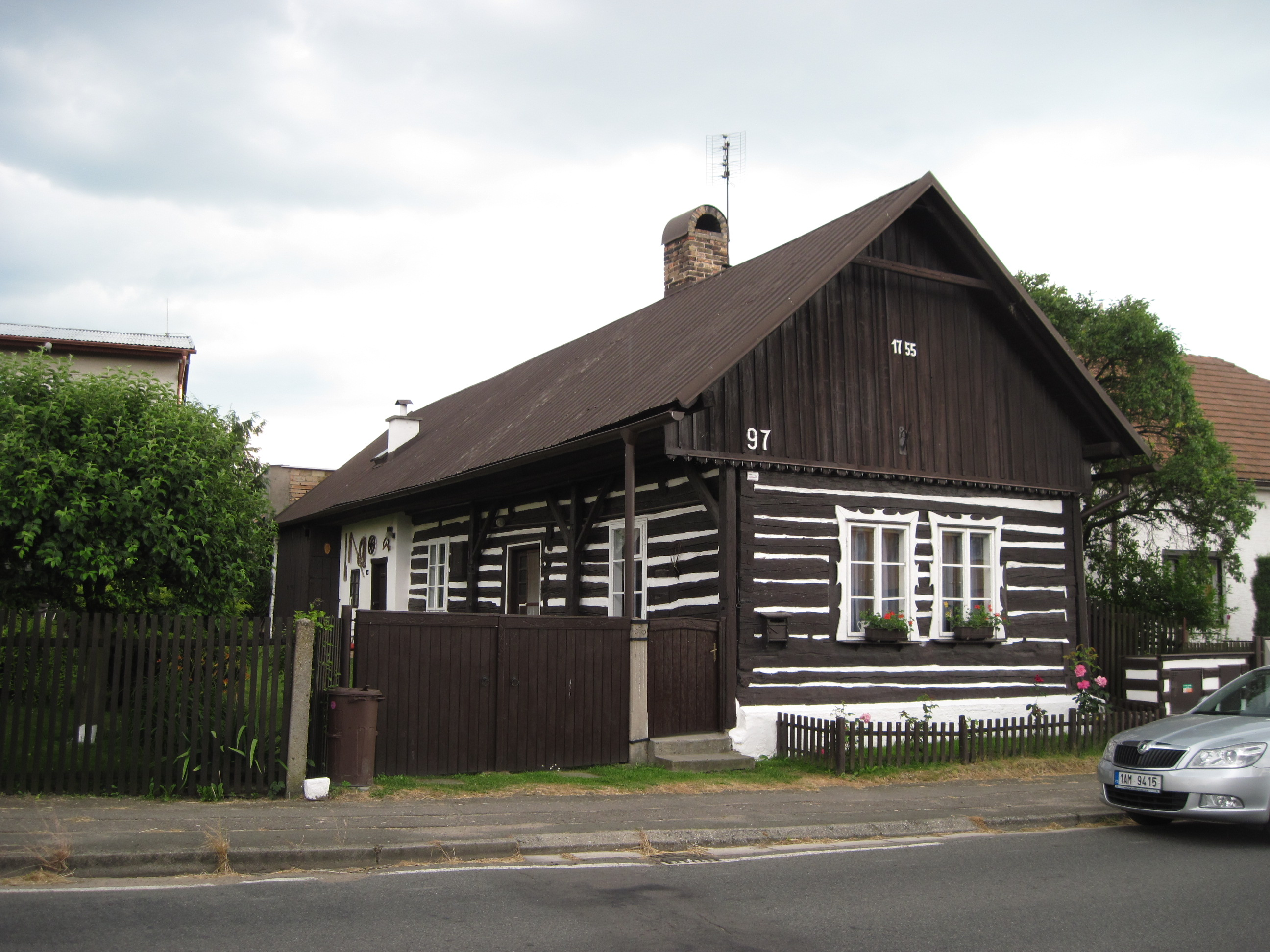 ul. Staroholická